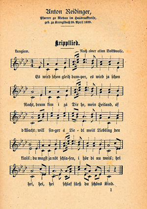 Noten zum Lied Es wird scho glei dumpa (Es wird schon gleich dunkel)